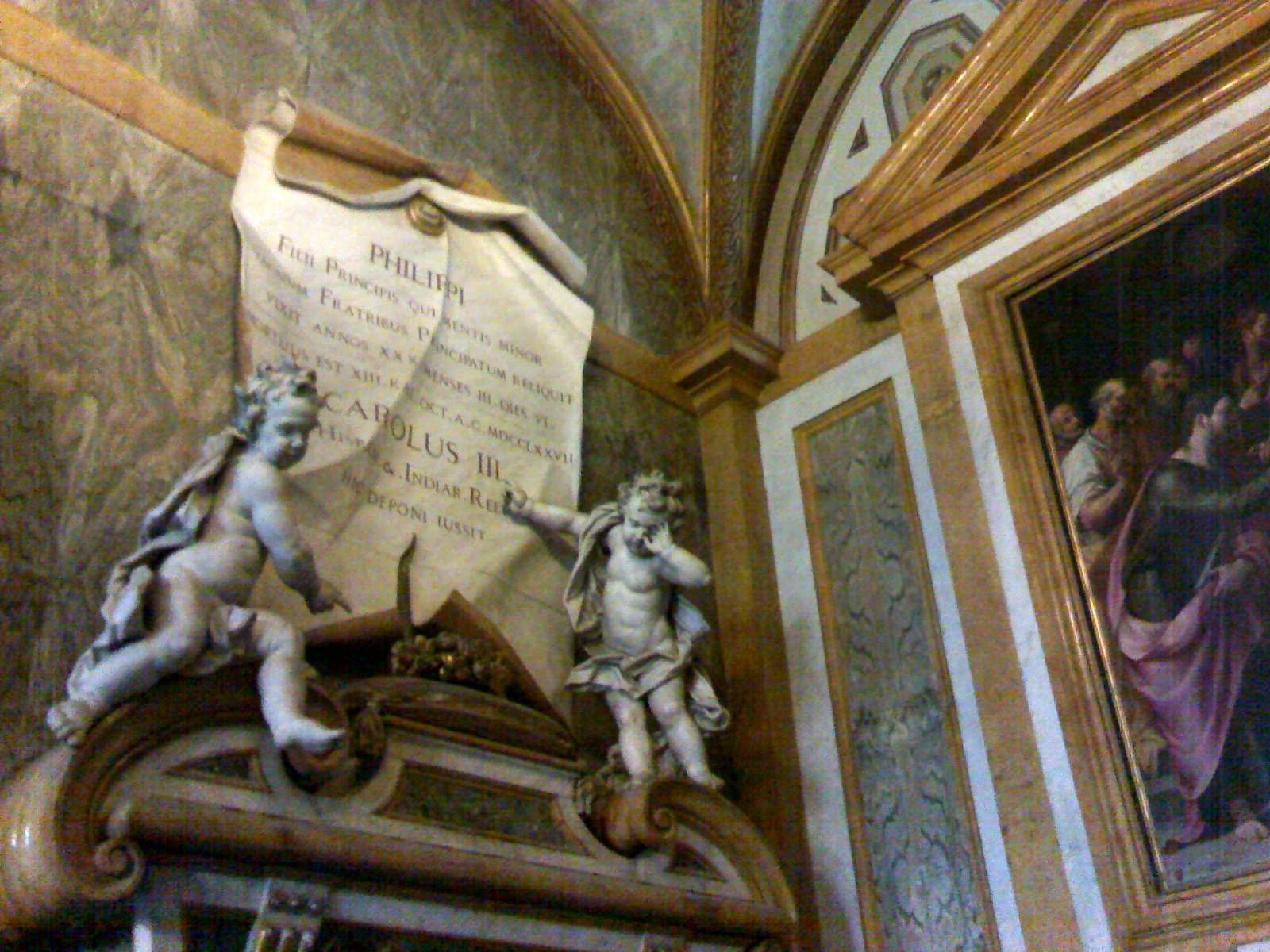 Cappella dei Borbone - Monumento funebre a Filippo di Borbone (Basilica di Santa Chiara - Napoli, opera id Giuseppe Sanmartino del 1777)